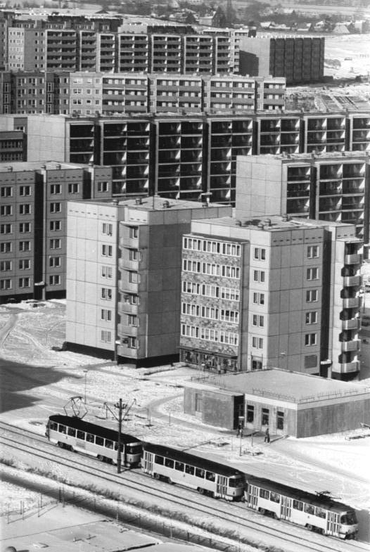 Dresden, Neubaugebiet Gorbitz, Wohnblocks, Winter ADN-ZB Hiekel 12.2,87 Dresden: Neubaugebiet Gorbitz - Seit 1981 entstand am südwestlichen Hang von Dresden mit dem Großstandort Gorbitz das umfangreichste Neubaugebiet des Bezirkes. Gegenwärtig sind bereits 11.000 Wohnungen, die 29 500 Dresdnern ein modernes Zuhause bieten, übergeben.-siehe auch 1987-0212-11N